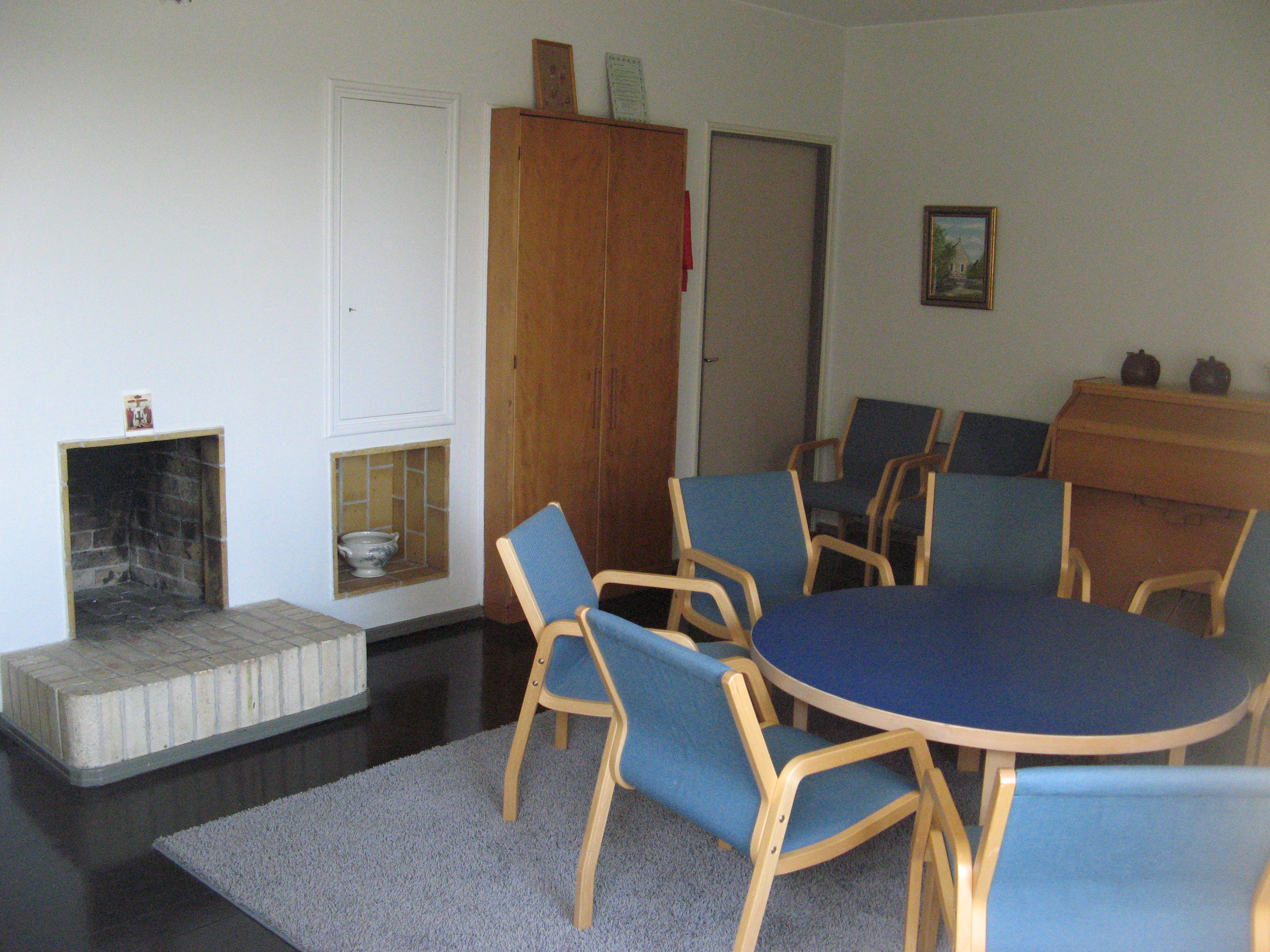 Ett av de större rummen i Villa Staffans på Senaps kurs- och lägergård.